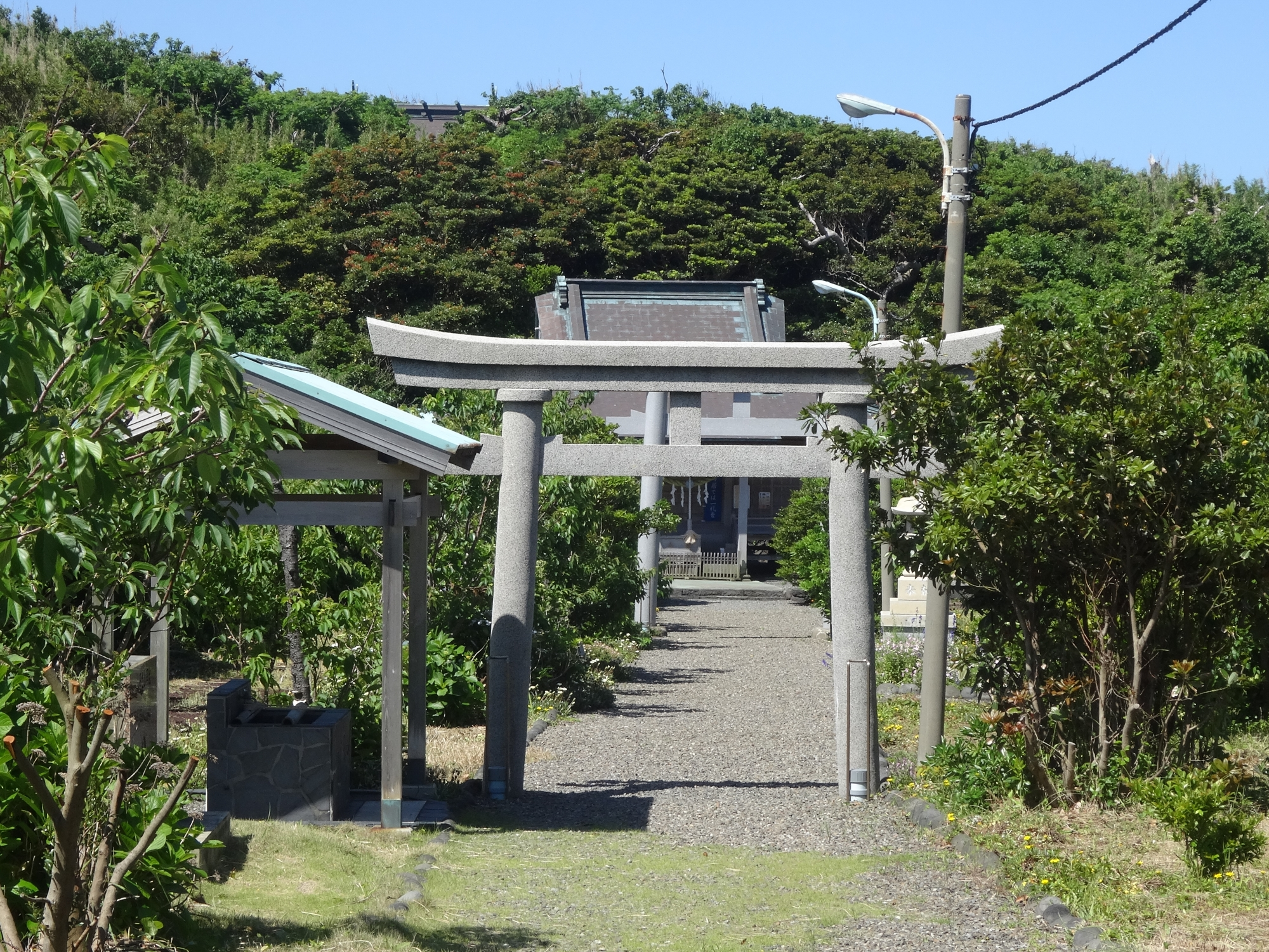 東京都三宅村にある富賀神社